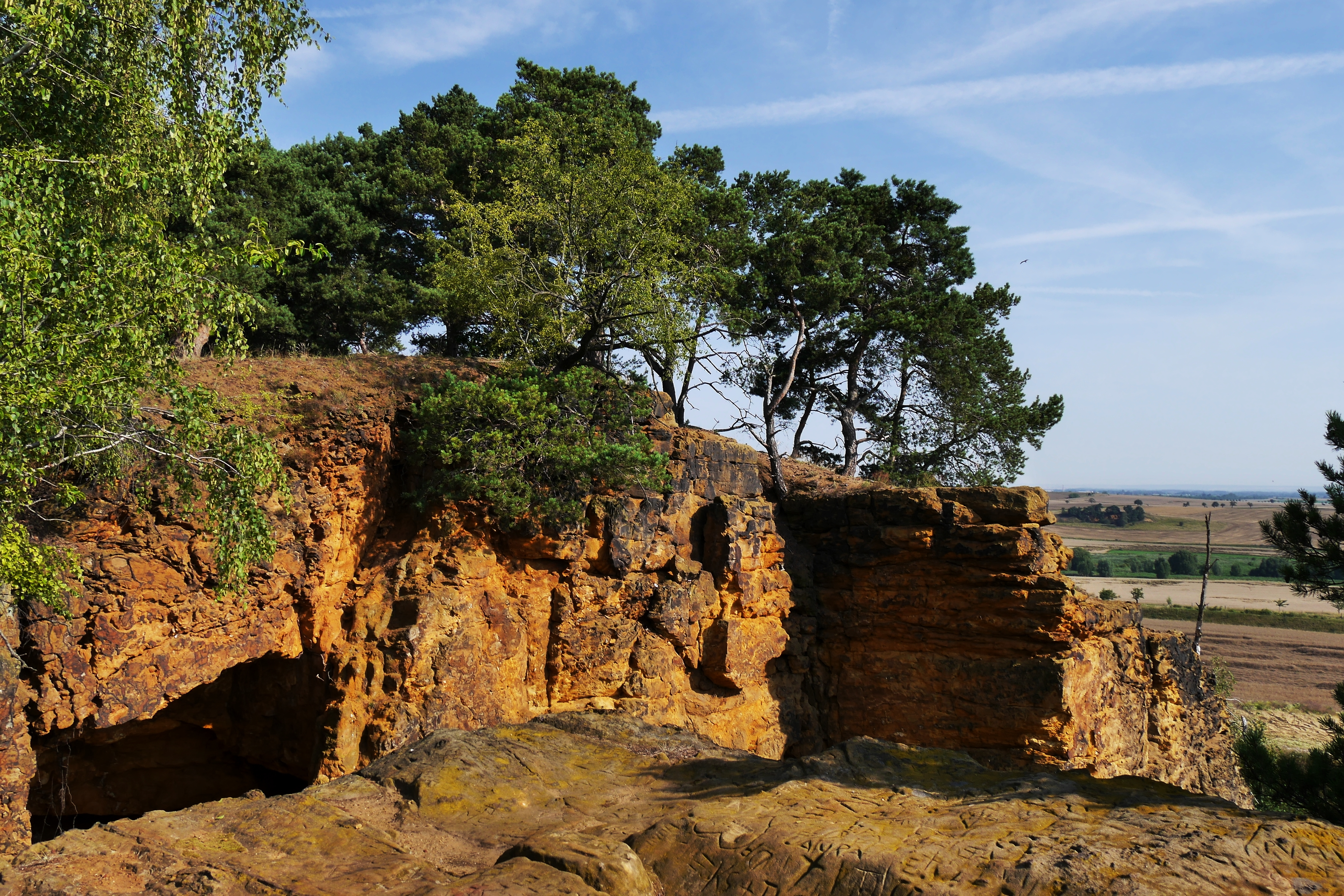 Ansicht des Lehof-Felsens, einem Sandsteinfelsen nördlich von Quedlinburg, Sachsen-Anhalt